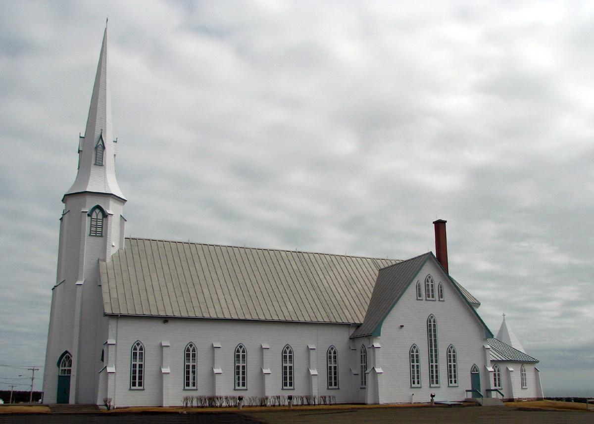 Église Saint-Pierre, à Lavernière (Étang-du-Nord), sur l'île du Cap-aux-Meules.